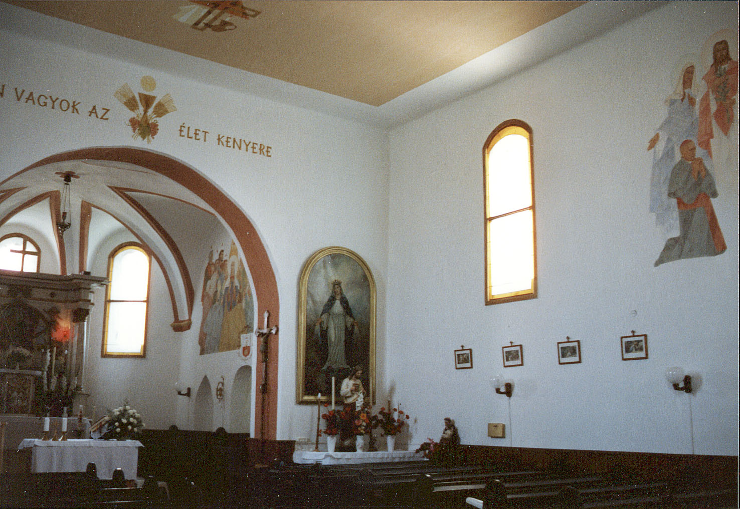 A kép a leveleki Szentháromság római katolikus templom belsejét ábrázolja. ID 8289 Gótikus, 14. sz. első fele. Átépítve a 17. sz.-ban. Megújítva 1852-1854 között.- Szabolcs-Szatmár-Bereg m., Levelek, Hősök tere 1. This is a photo of a monument in Hungary, Identifier: 8289